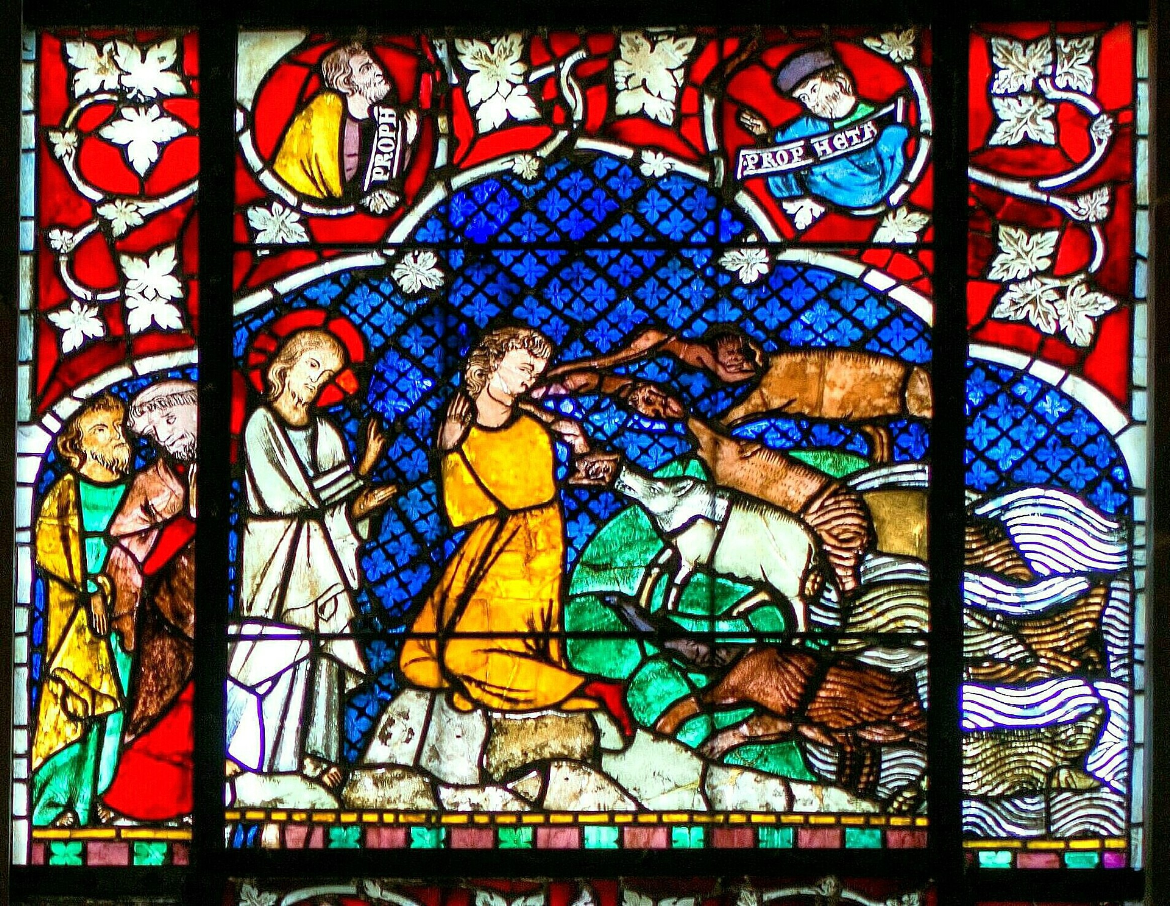 Austreibung von Legion. Südliches Seitenschiff, 2. Fenster, 12. Scheibe. Jesus treibt in Gadara Dämonen aus, die in eine Schweineherde fahren. Die Schweine stürzen sich in den See Genezareth, wo sie ertrinken.